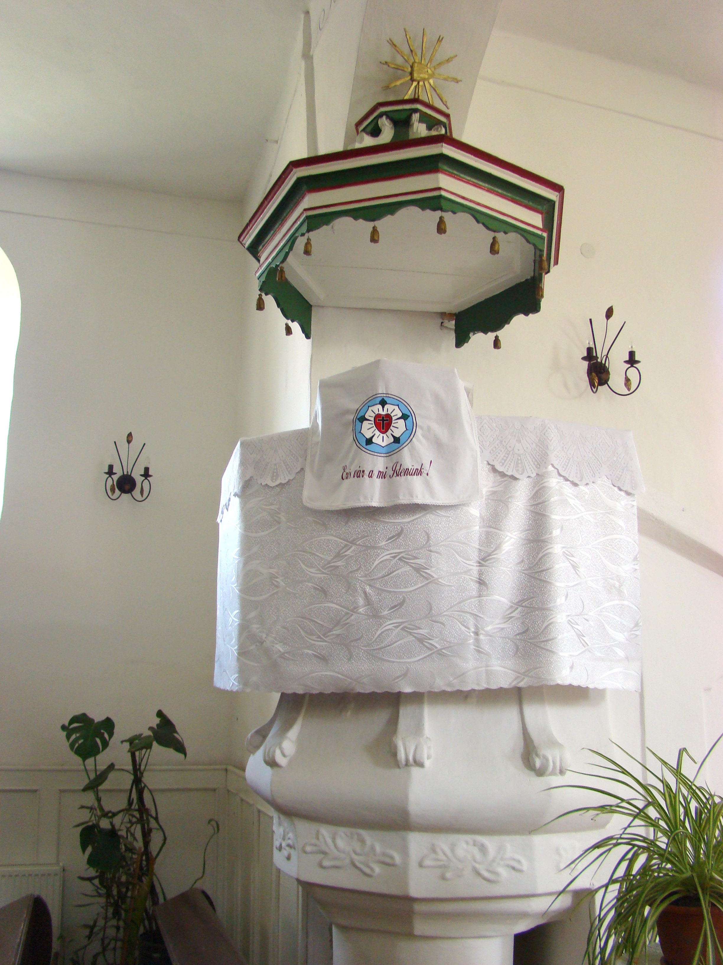 Biserica evanghelică, oraș Copșa Mică, str. Mediașului 100 01